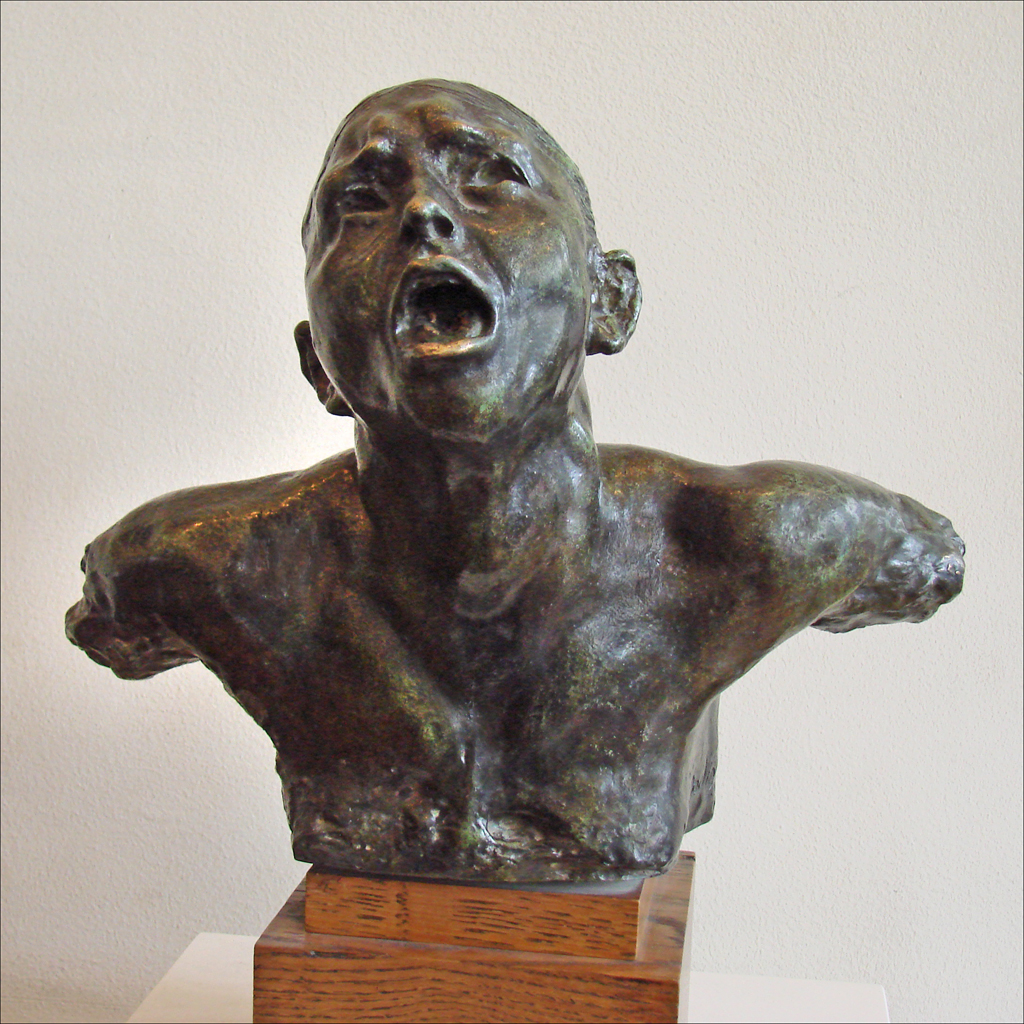 Le Cri The Cry vers 1886 Auguste Rodin (1840-1917) Bronze, fonte Georges Rudier 1961 Fonte réalisée pour les collections du musée S.1126 Le site du musée Rodin a enfin été rénové !